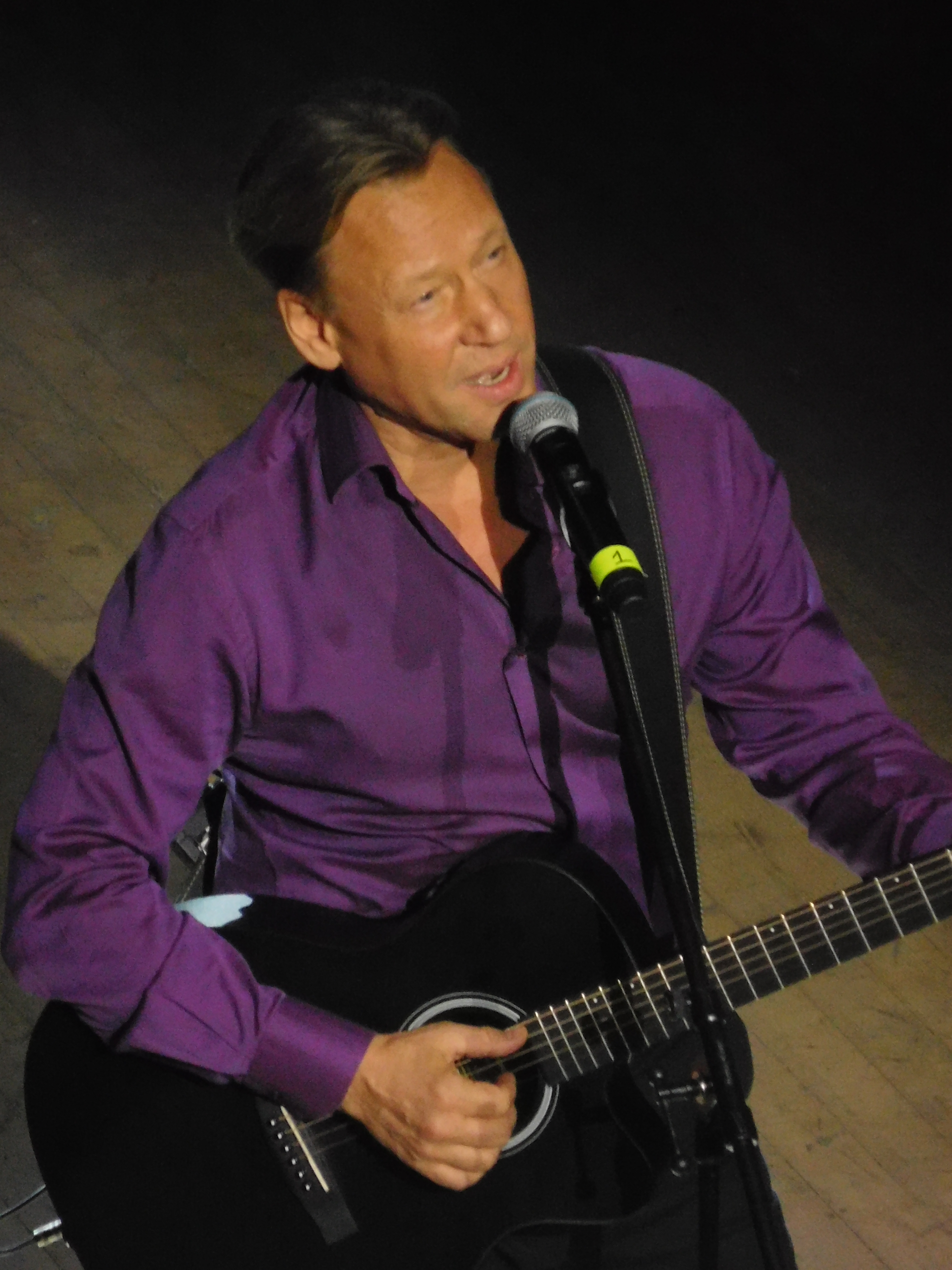 Дмитрий Харатьян в 2017 году